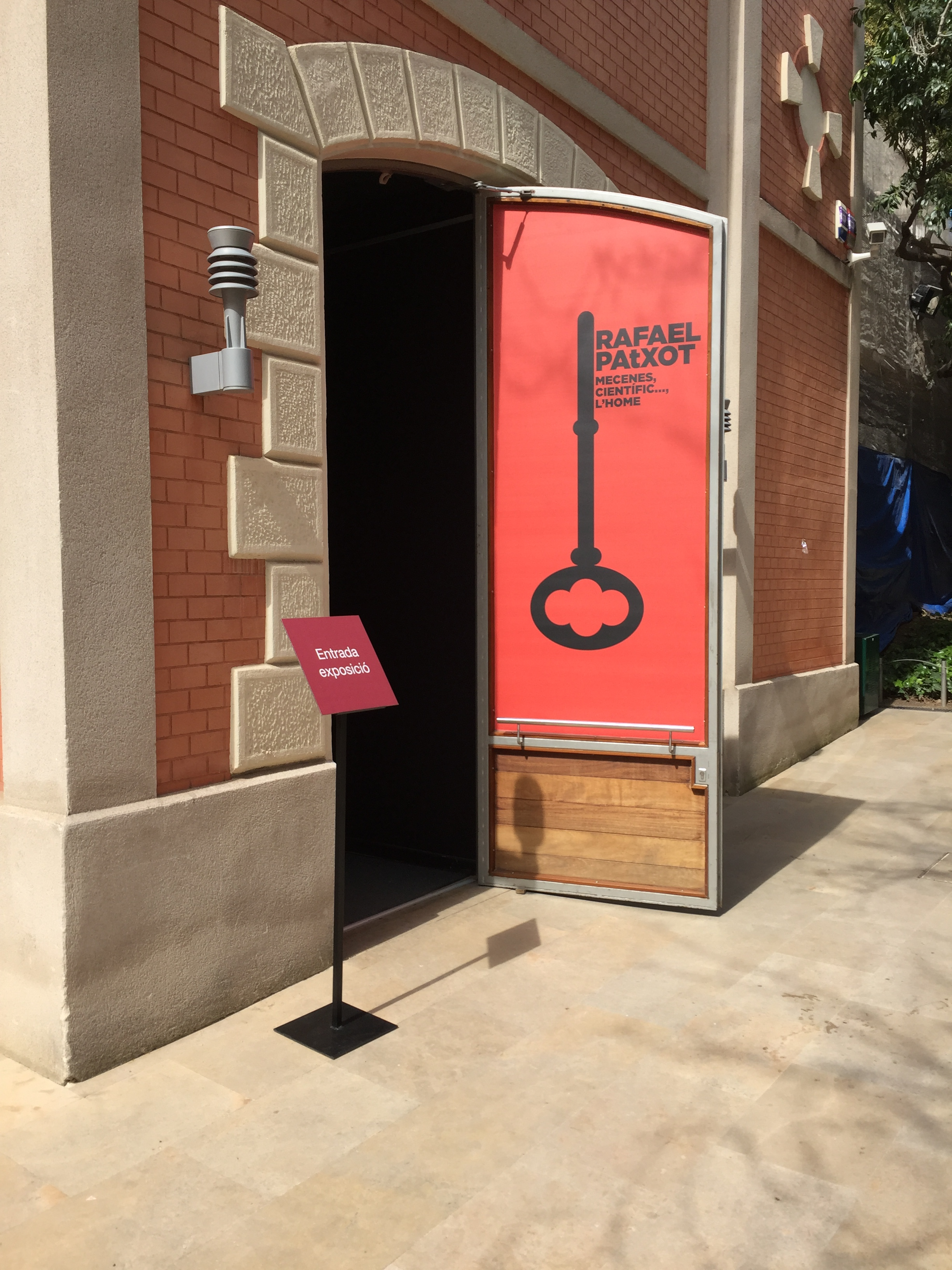 Rafael patxot exhibit palau Robert